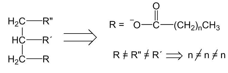 Estructura química de un triglicérido